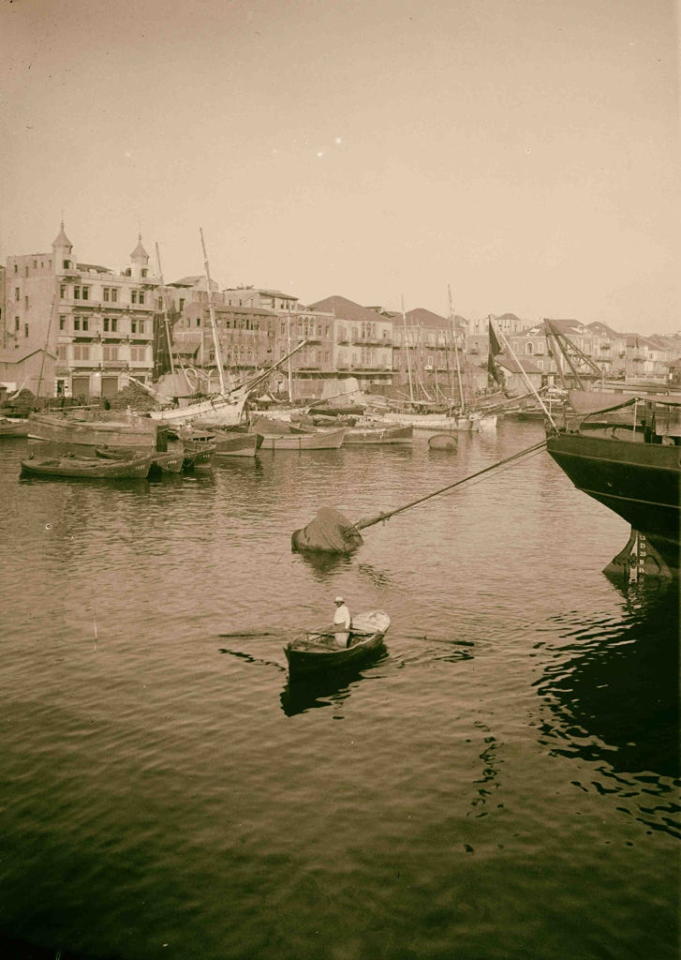 مرافئ بيروت عام ١٩٣٤